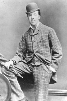 Oscar Wilde (1854-1900)